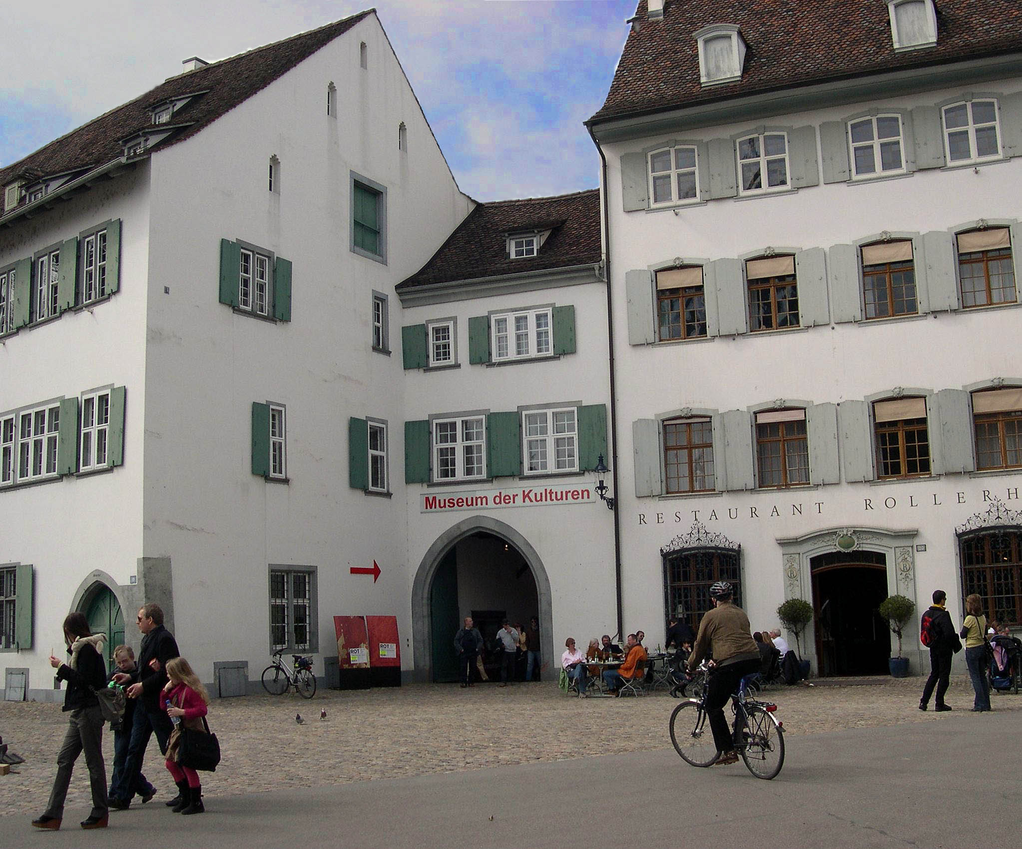 Museum der Kulturen, Basel